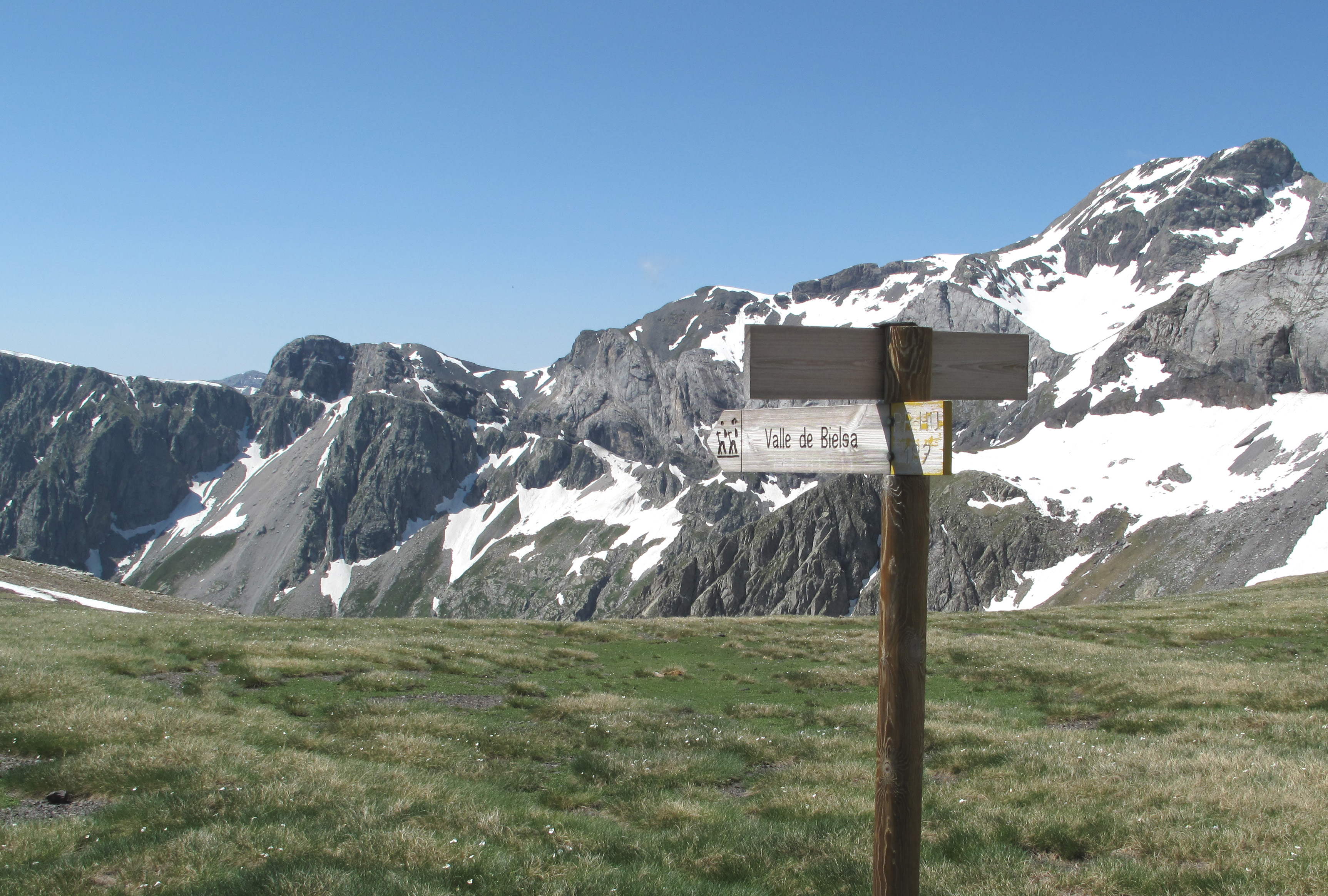 Partie sud du cirque de Barrosa vue du port de Barroude, avec, à gauche, le col d'Espluca Ruego d'où part la corniche du chemin des mines, soulignée par la neige, dans le prolongement de la sierra de Liena ; à droite, le pic Robiñera.